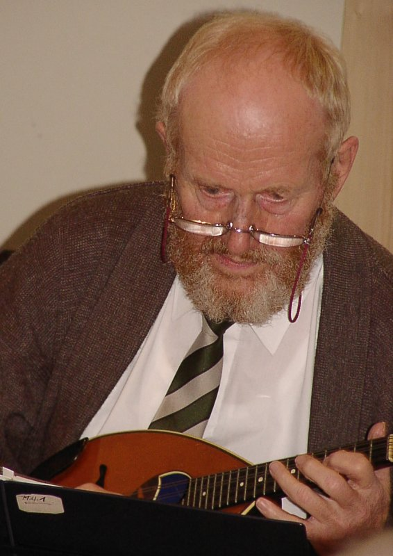 Erhard Fietz, 25 Jahre Mühlfietz